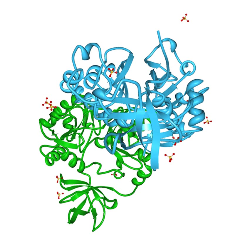 Estructura 3D de la aminometiltransferasa creada con el ProteinWorkshop.